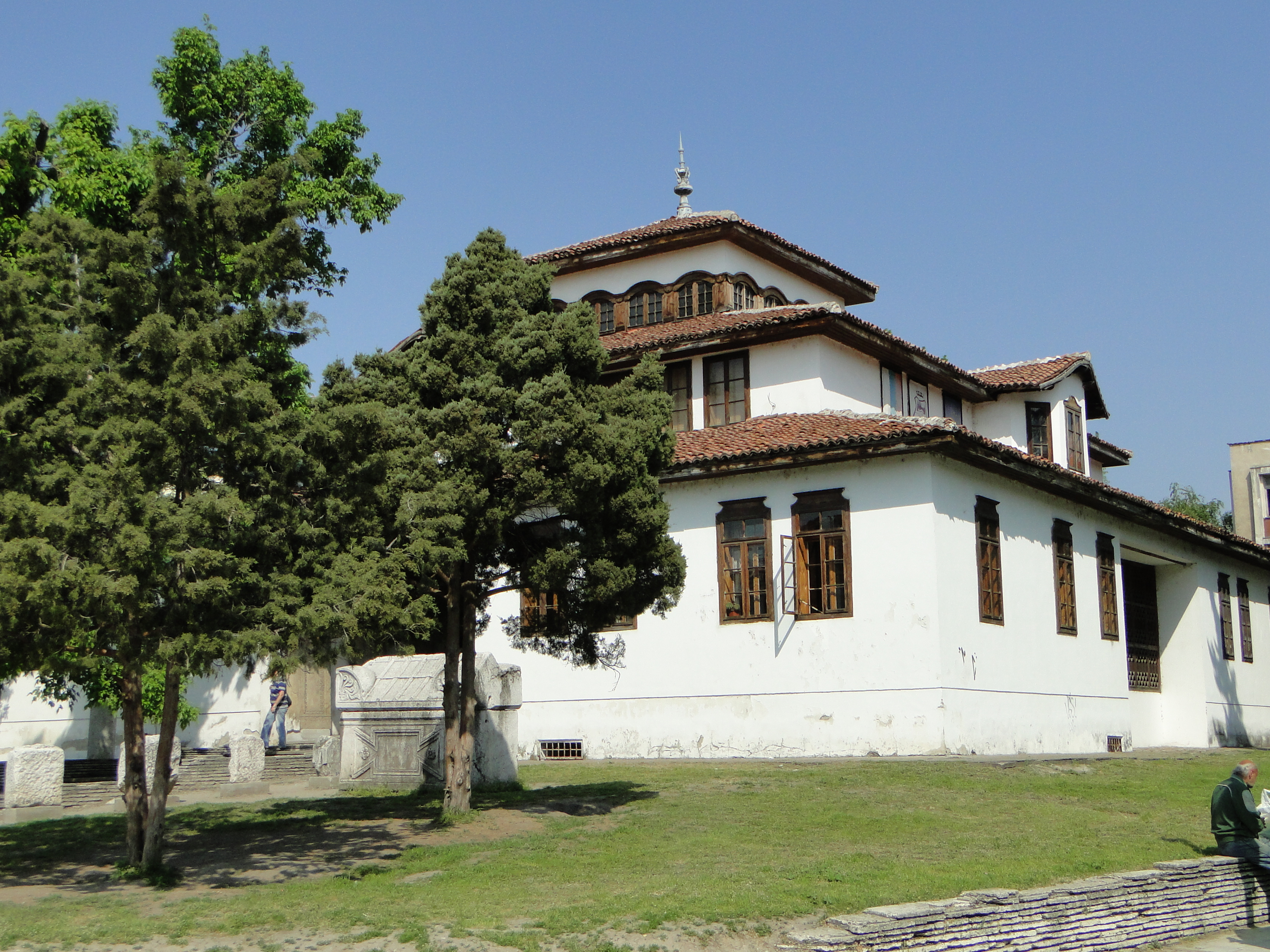 Видин, май 2013